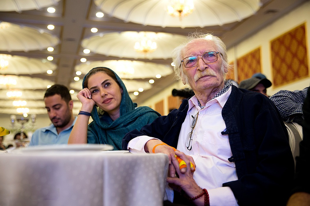 نخستین دوره جایزه «آکادمی سینما سینما» به ریاست کیانوش عیاری